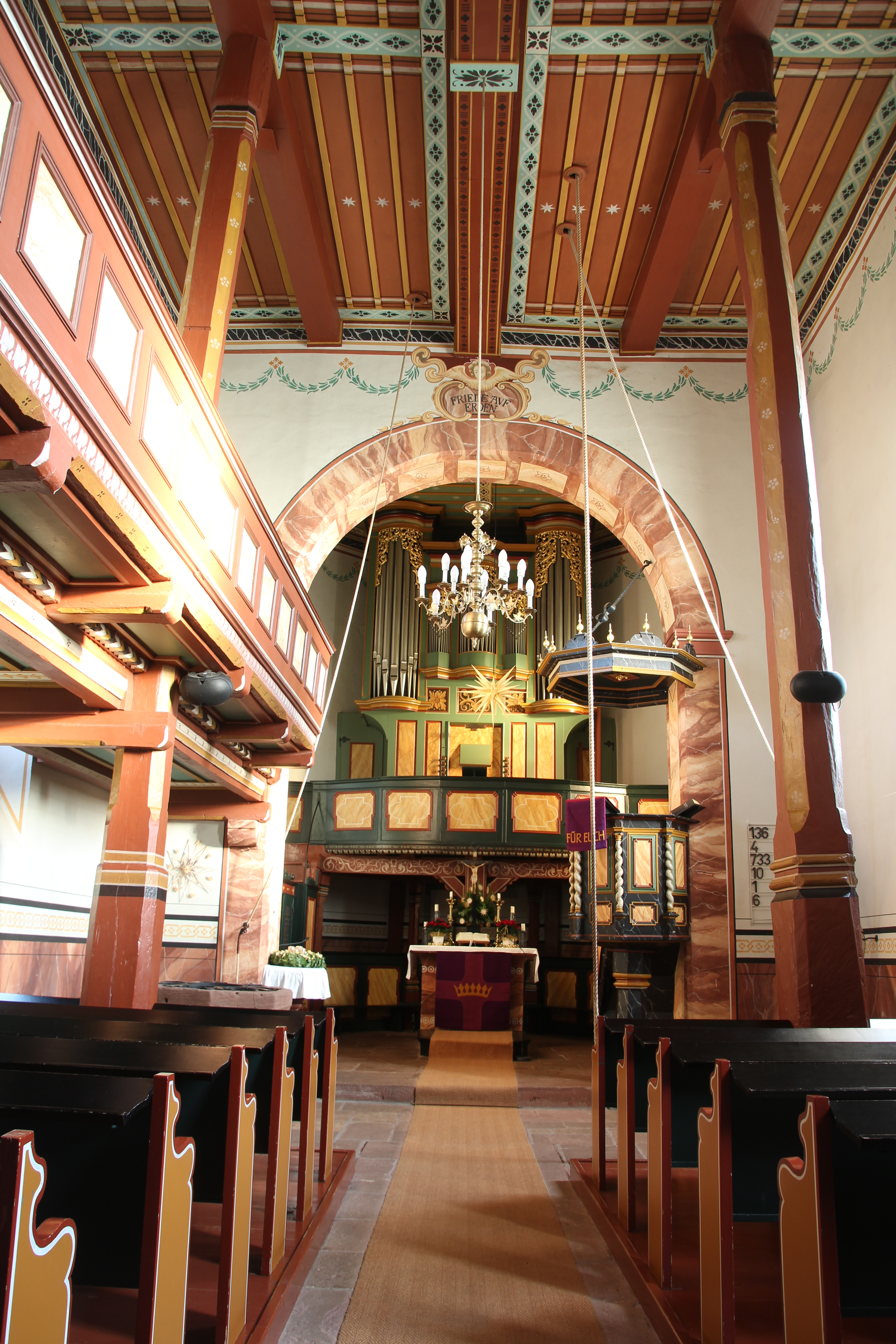 Siehe Bild und Dateiname